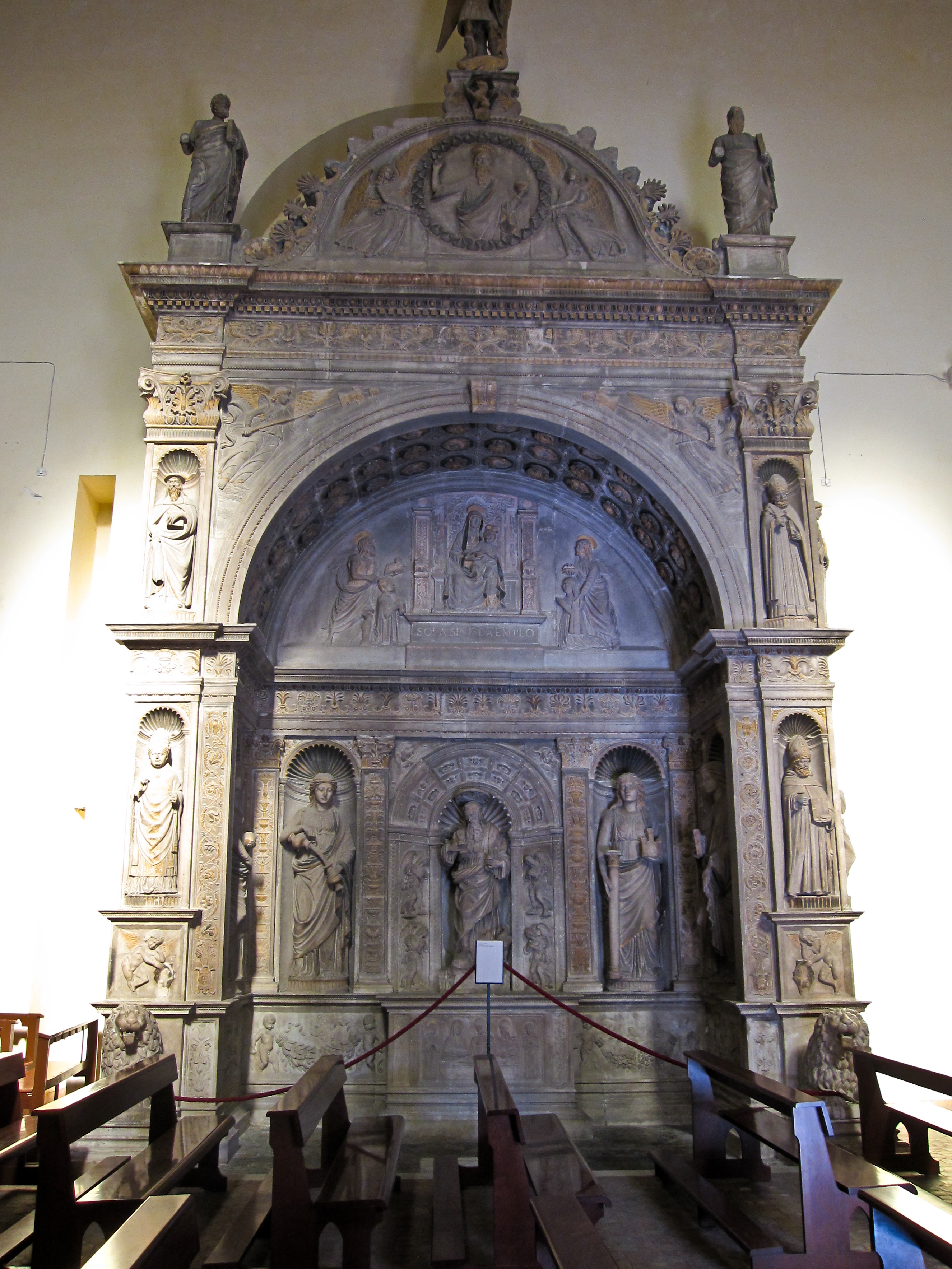 Un monumemnto funebre posto nella navata Chiesa di San Giovanni a Carbonara - Napoli